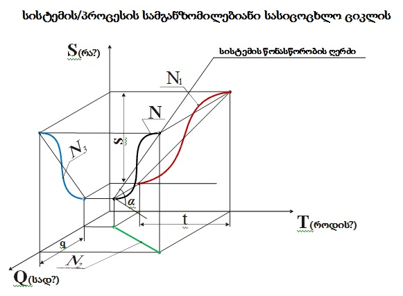 T - დრო; S - სისტემის/პროცესის მთავარი მაჩვენებელი (ს/პმმ) Q - სივრცე. გრაფიკზე ნაჩვენებია N-სისტემის S-მთავარი მაჩვენებლების განვითარების სრული ციკლი, T-დროში და Q-სივრცეში. ST - ს/პმმ-ის განვითარების დინამიკა დროში; SQ - ს/პმმ-ის განვითარების დინამიკა სივრცეში; TQ - ს/პმმ-ის სრული ციკლი დროსა და სივრცეში.